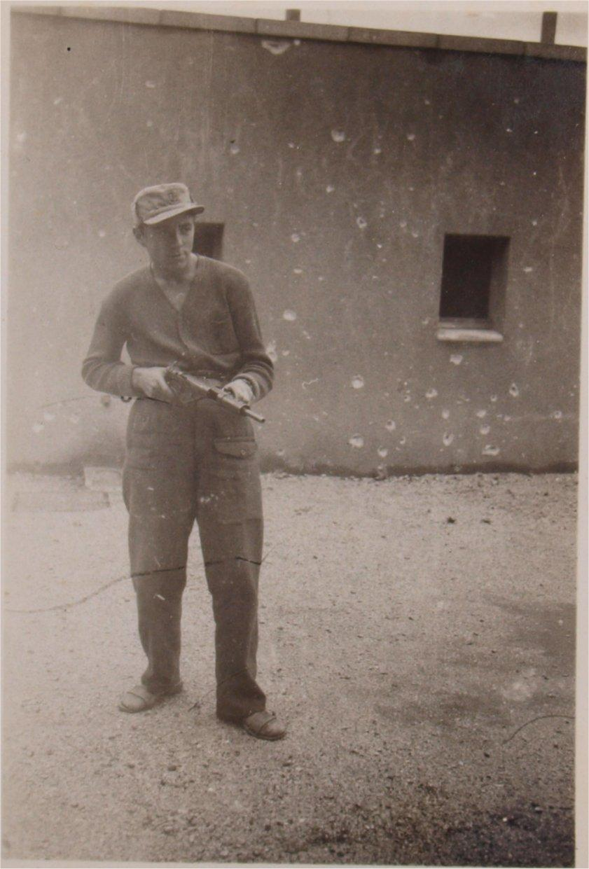 אבא באימון בדצבמר 1948